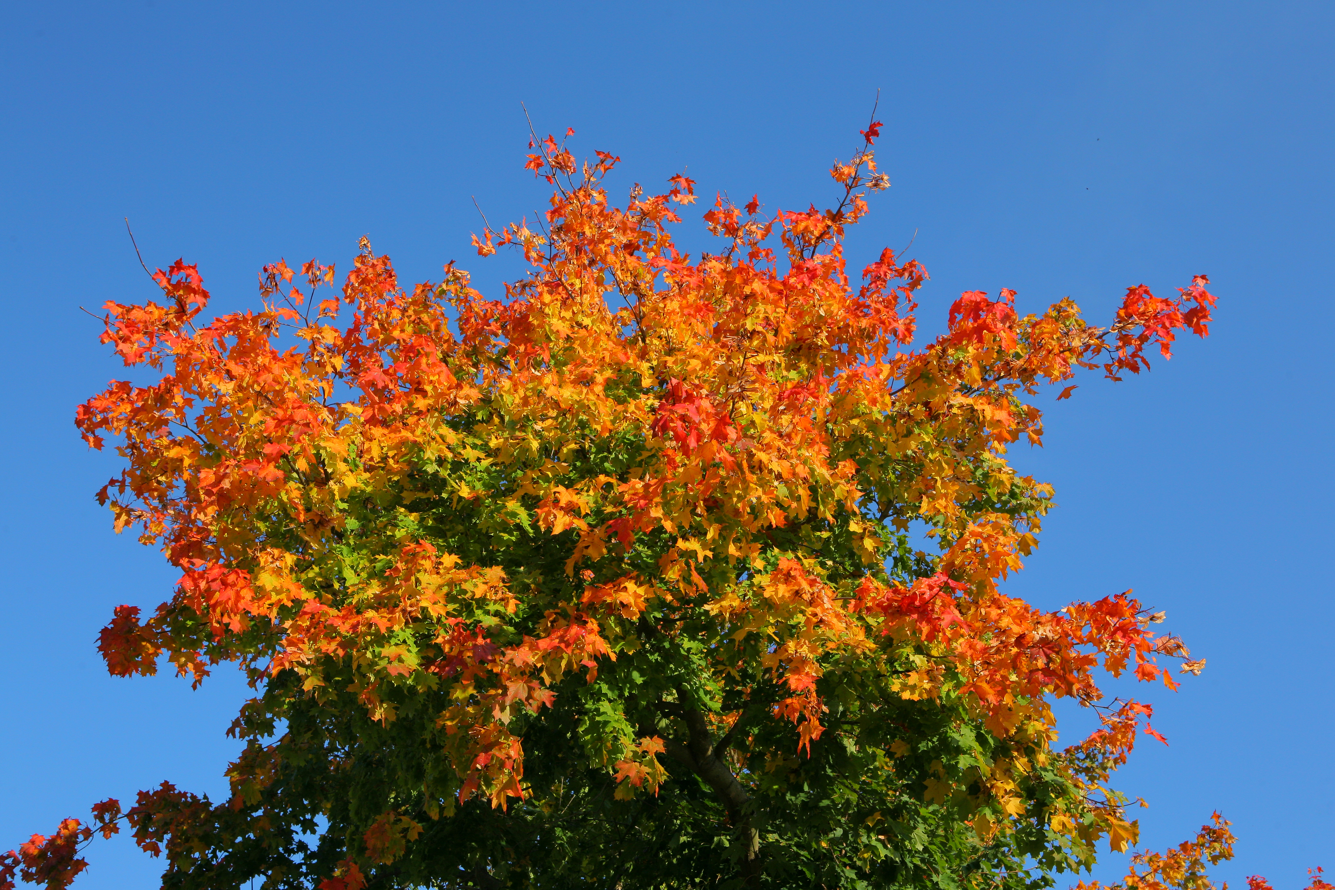 Late summer